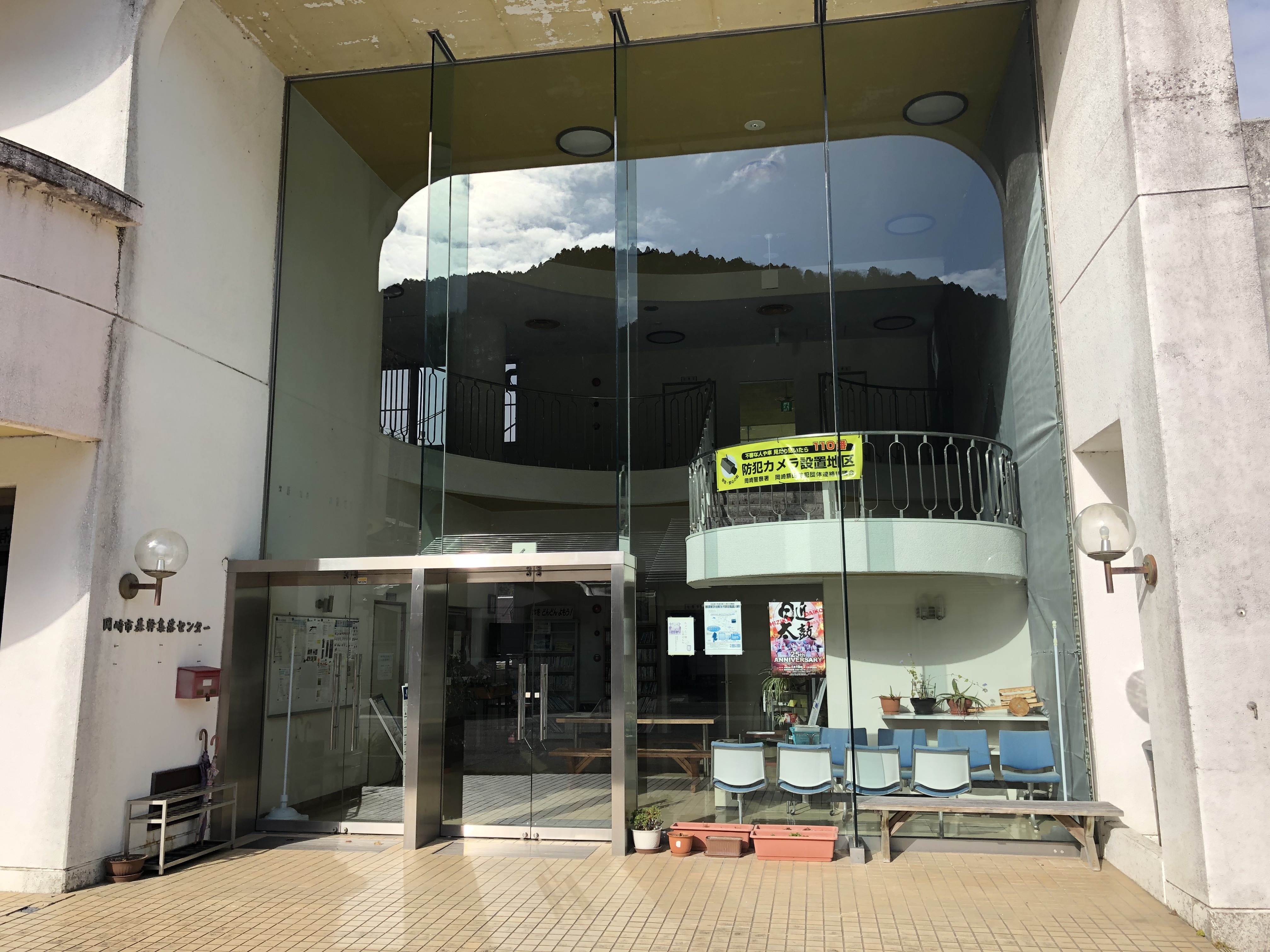 岡崎市基幹集落センター（岡崎市桜形町）